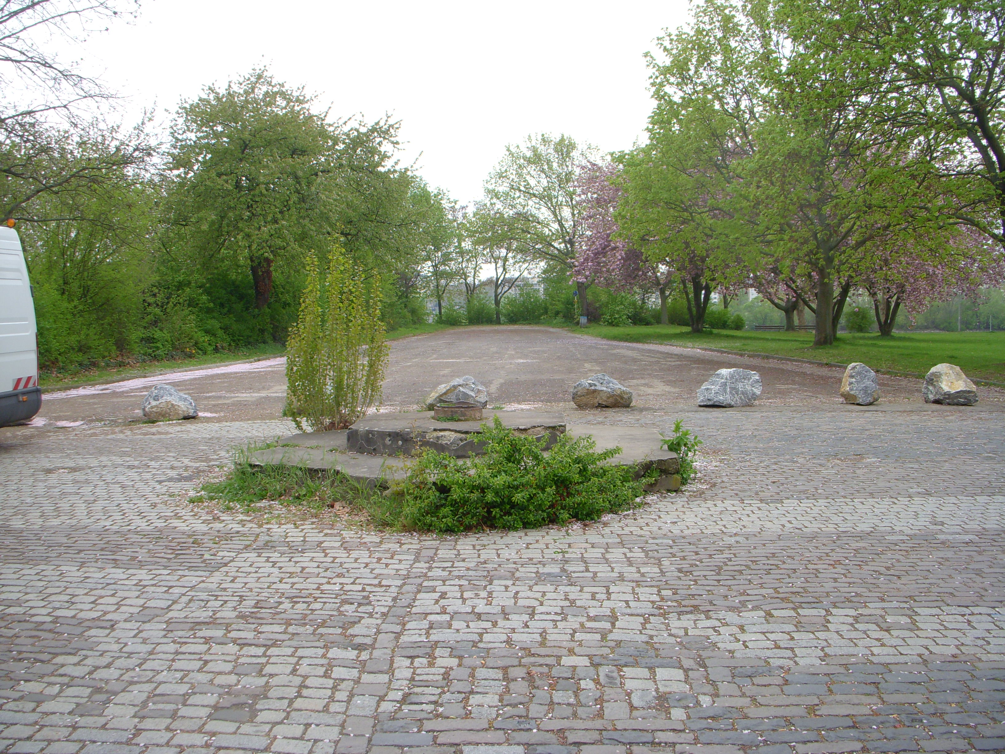 Rampe der Alexander-M.-Patch-Brücke, Rathenau-Platz/Eleonorenstraße Mainz-Kastel